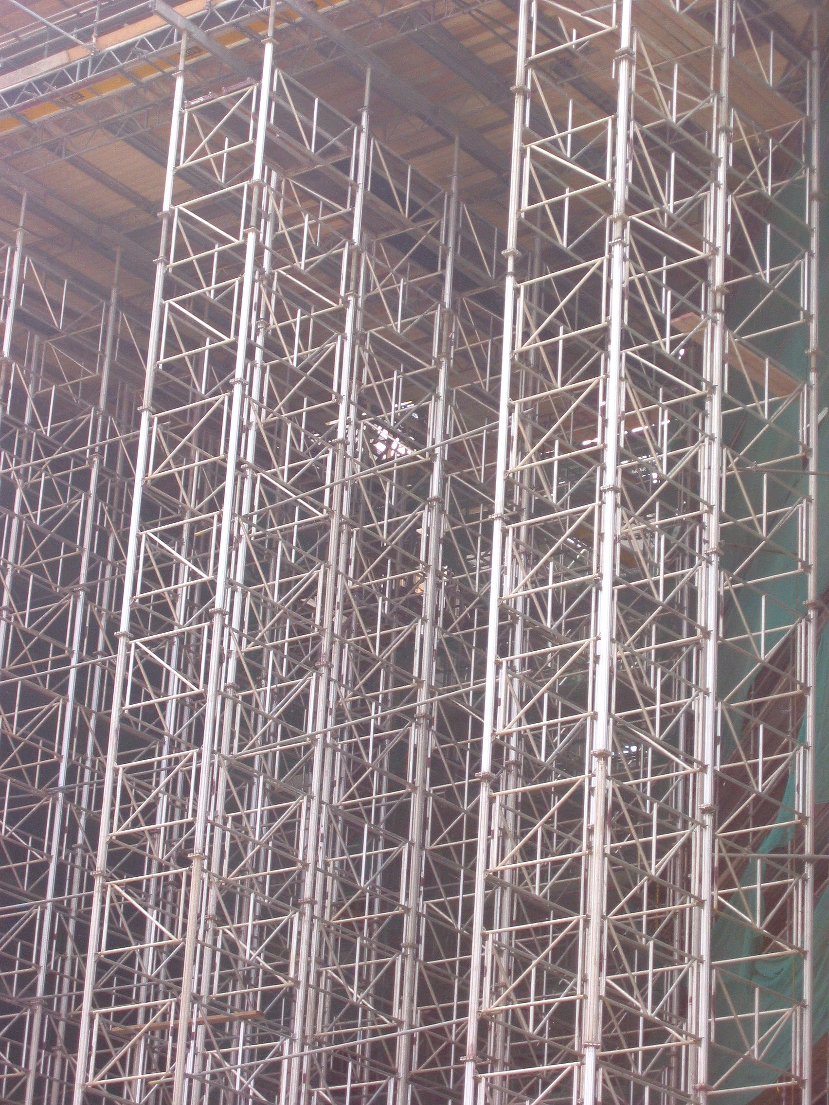 (Bouwsteiger) (Scaffolding